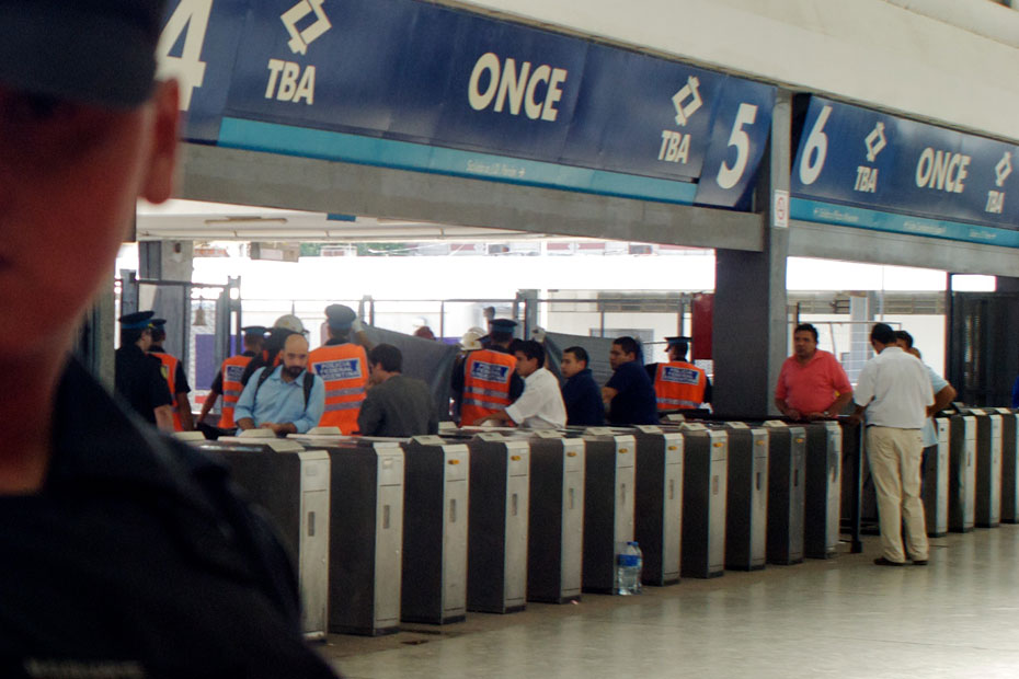 La estación de Once (Buenos Aires), luego de la tragedia dejó un saldo de 51 muertos y más de 600 heridos tras accidentarse una formación de la línea Sarmiento.